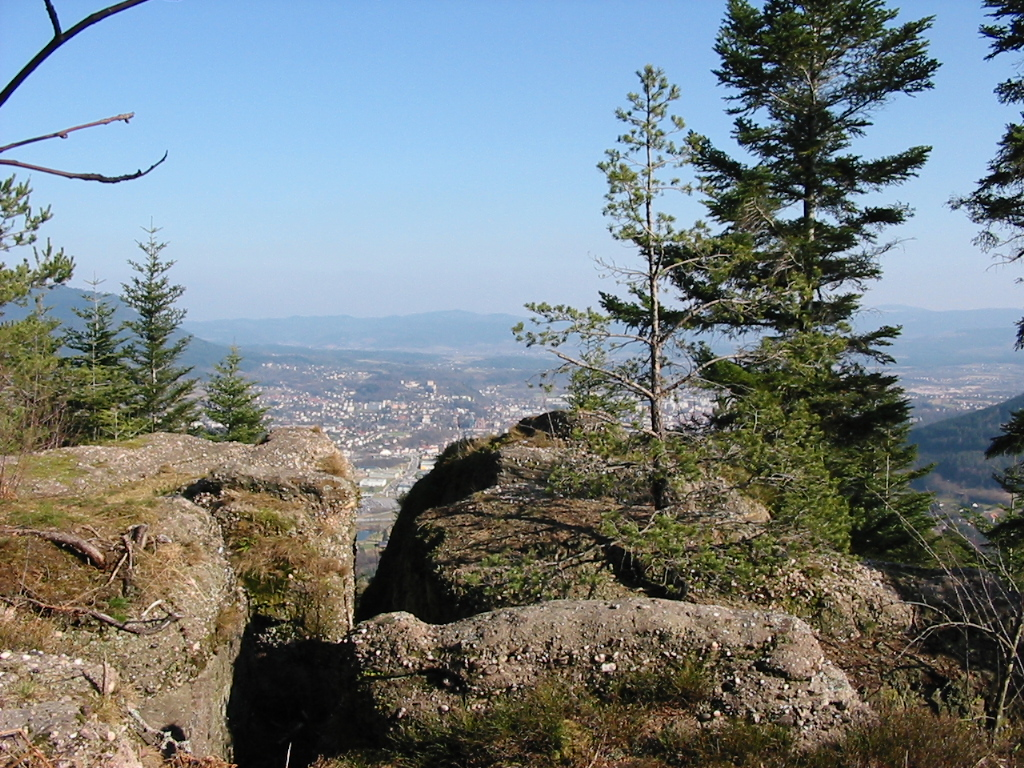 La Roche du Bihay, massif de la Madeleine, domine Saint-Dié-des-Vosges